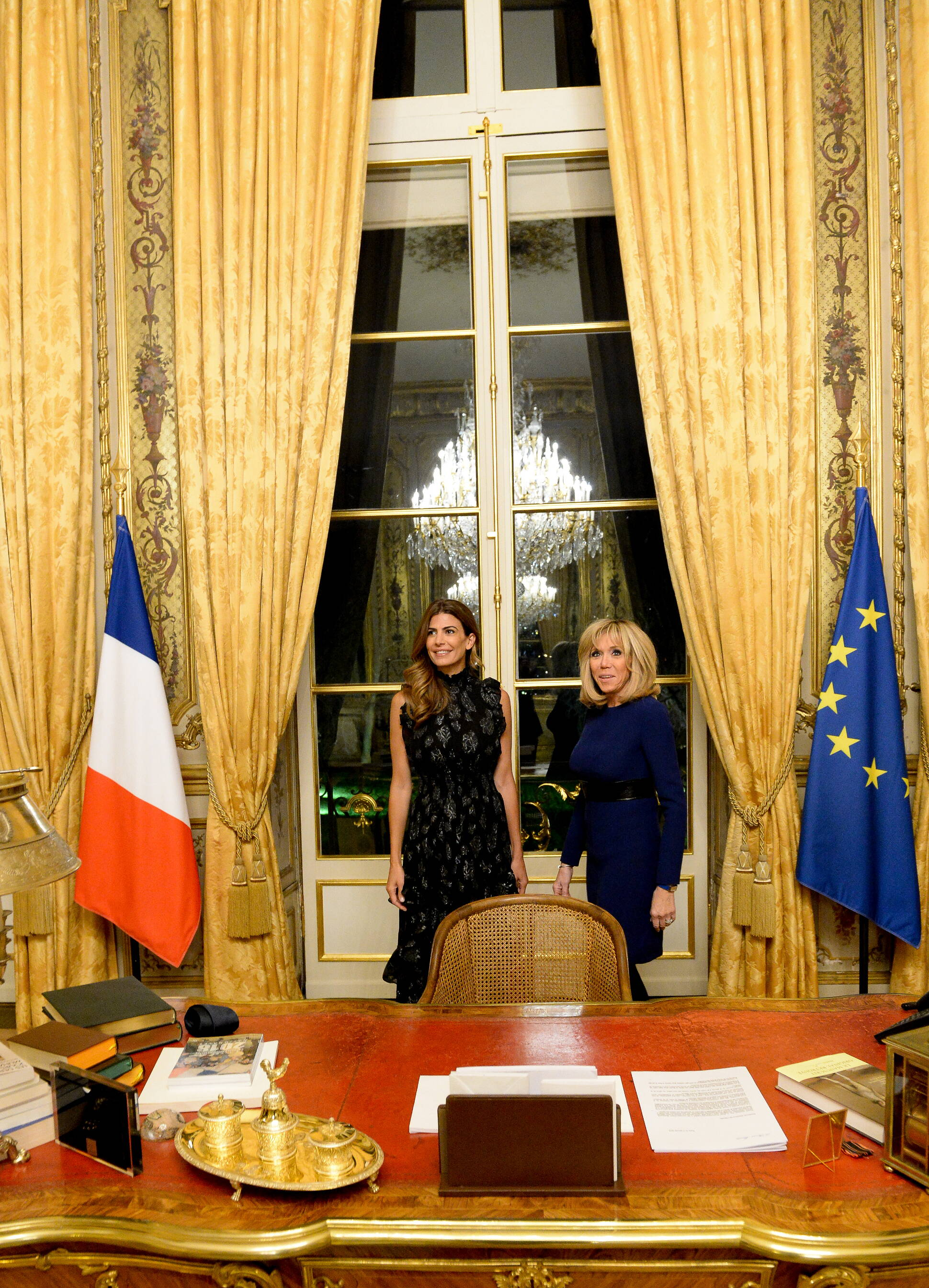 La primera dama Juliana Awada se reunió en el Palacio del Elíseo con su par francesa Brigitte Macrón, y cerró de esa forma la intensa agenda de encuentros que mantuvo en el viaje en el que acompañó al presidente Mauricio Macri a Moscú, Davos, y París.